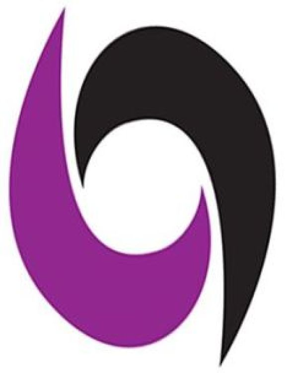 La Alzada, Acción Feminista Libertaria